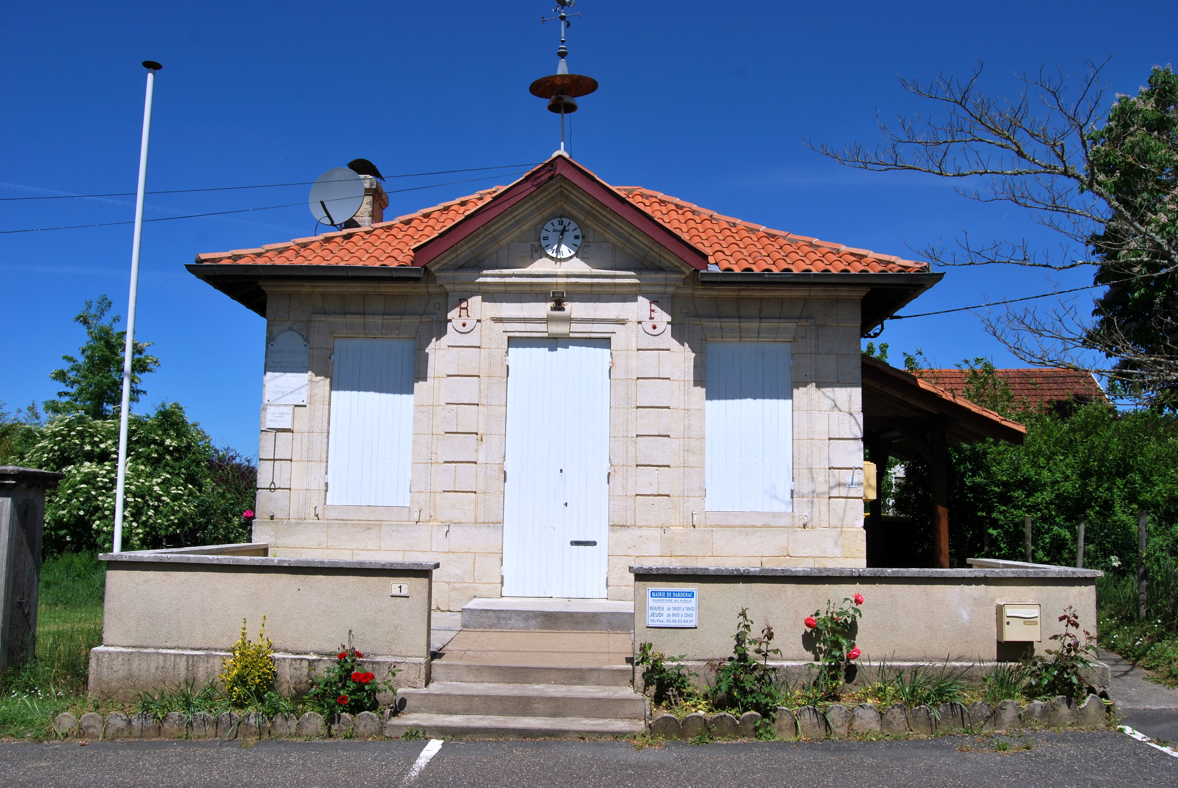 Dardenac Mairie